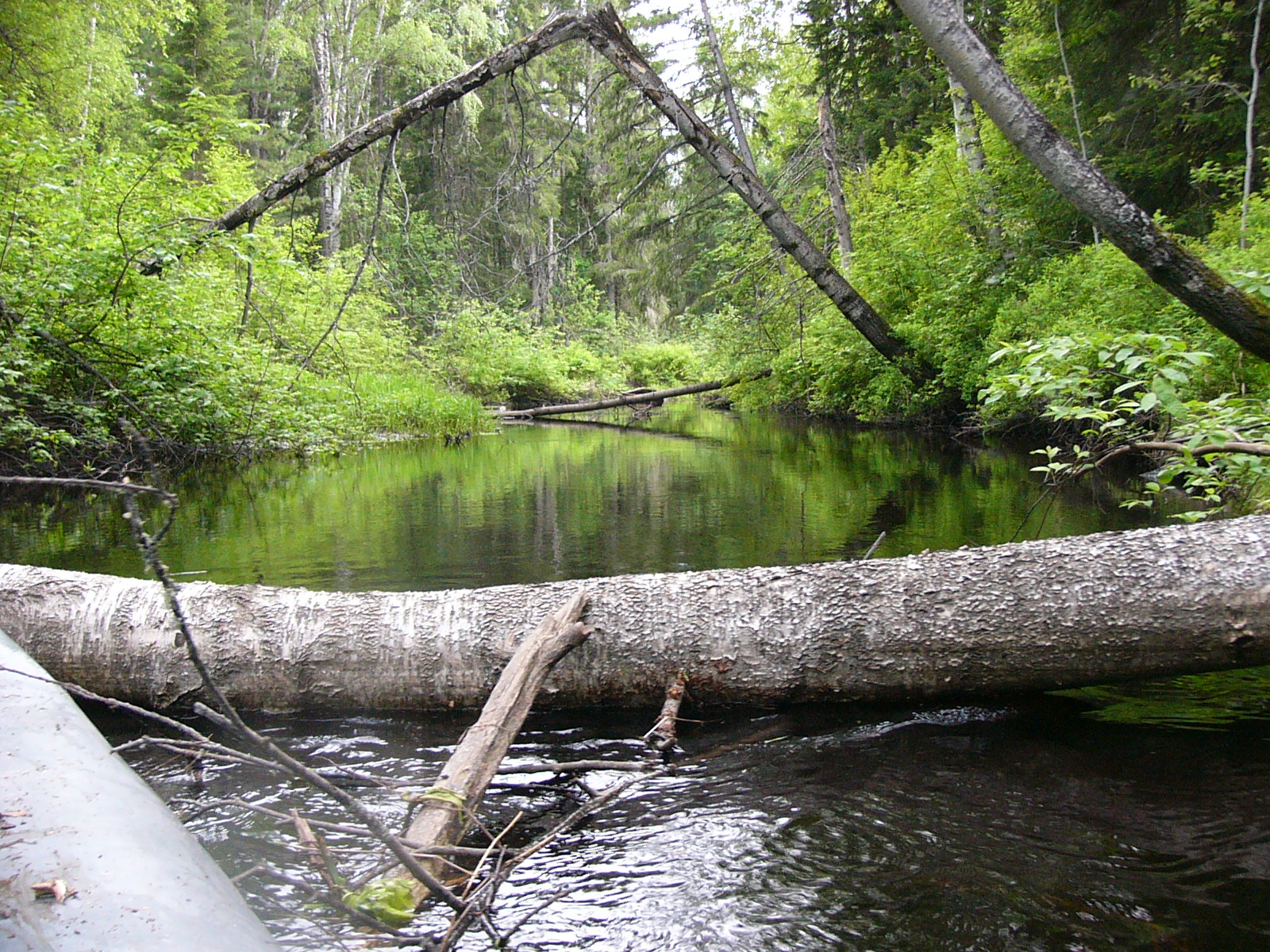 Татош